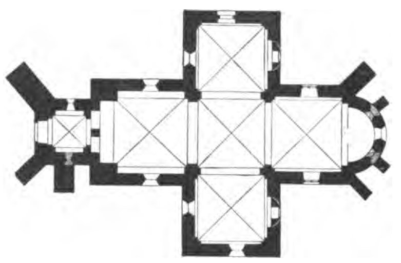 Grundriss der Kreuzkirche in Rehme, Stadt Bad Oeynhausen